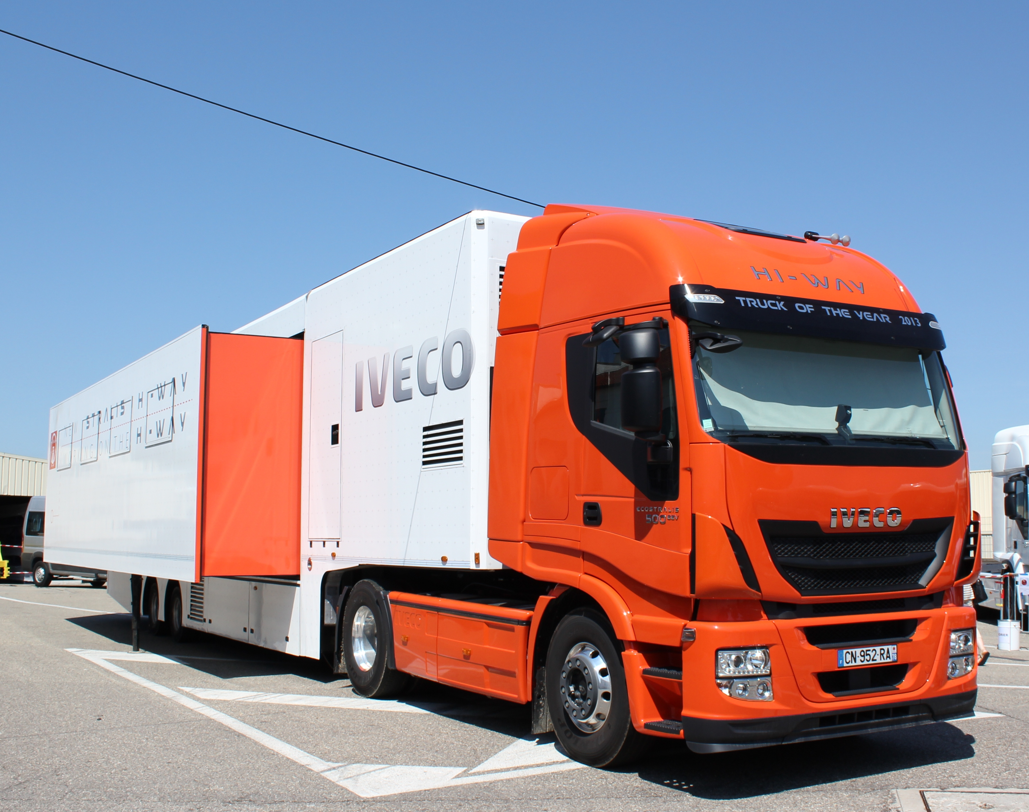 L'Iveco Stralis Hi-Way est stationné dans l'usine d'Irisbus Annonay